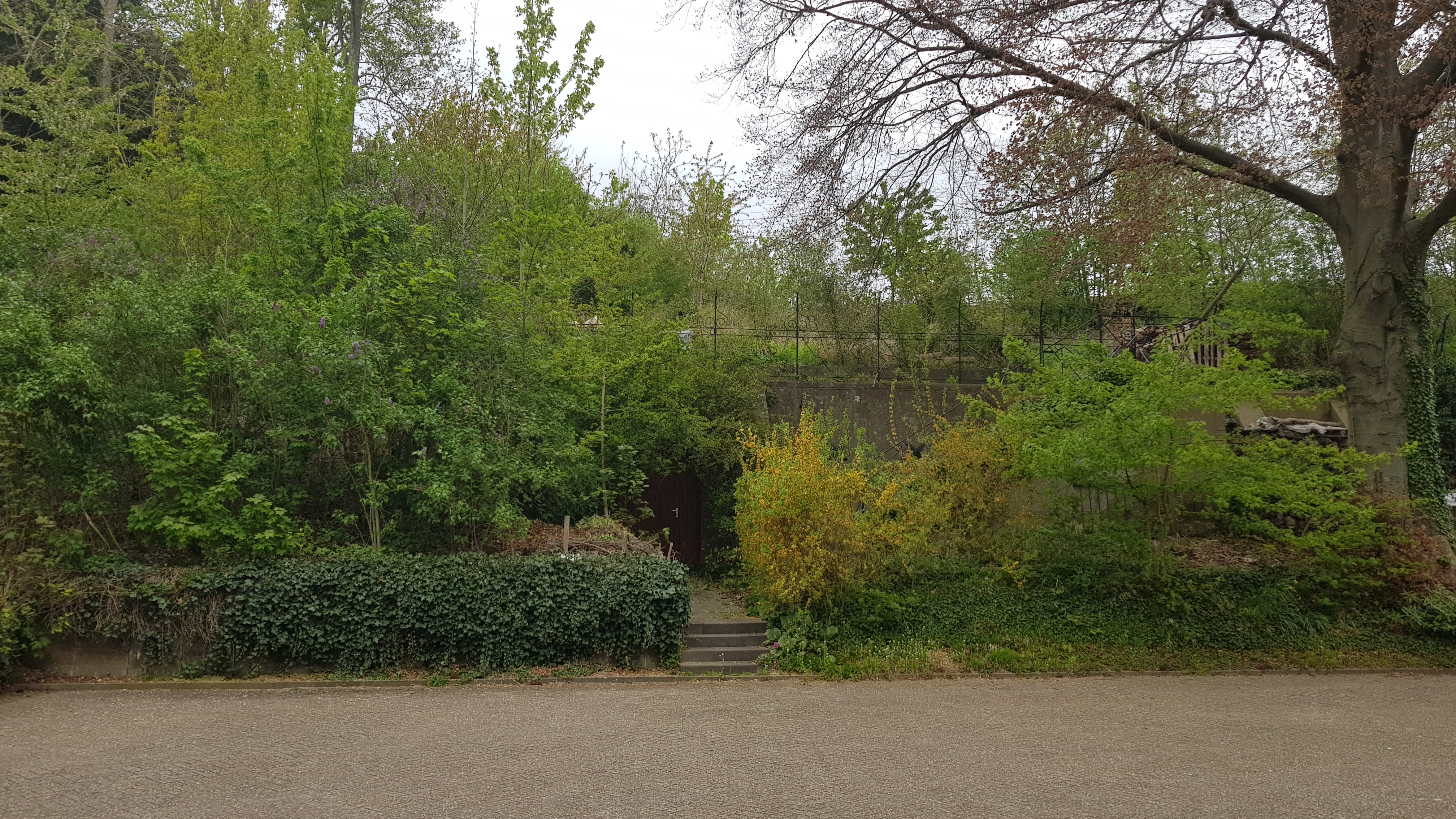 Oosterweggroeve I, Valkenburg aan de Geul, Nederland